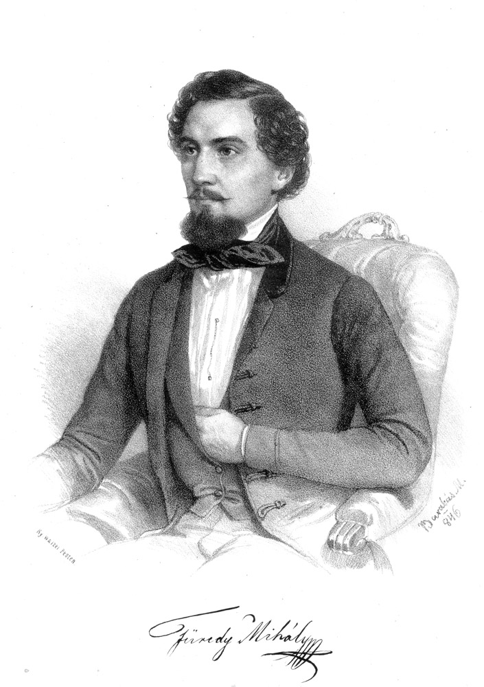 Füredi Mihály; Aszalkovics (Vác, 1816. április 18. – Újfalu, 1869. május 3.) operaénekes (bariton), dalszerző, népdalgyűjtő, színész.